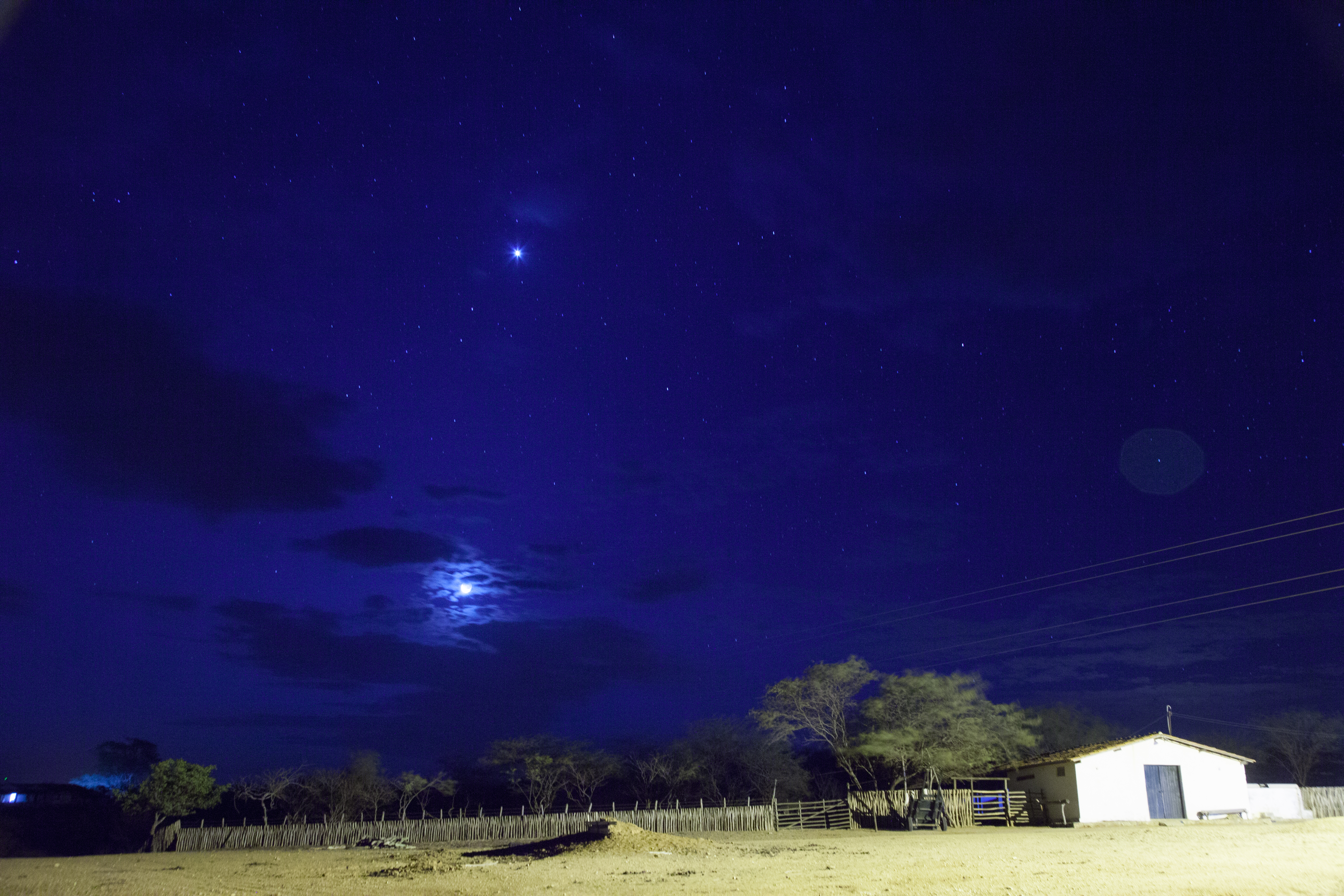 Exposição longa do estábulo